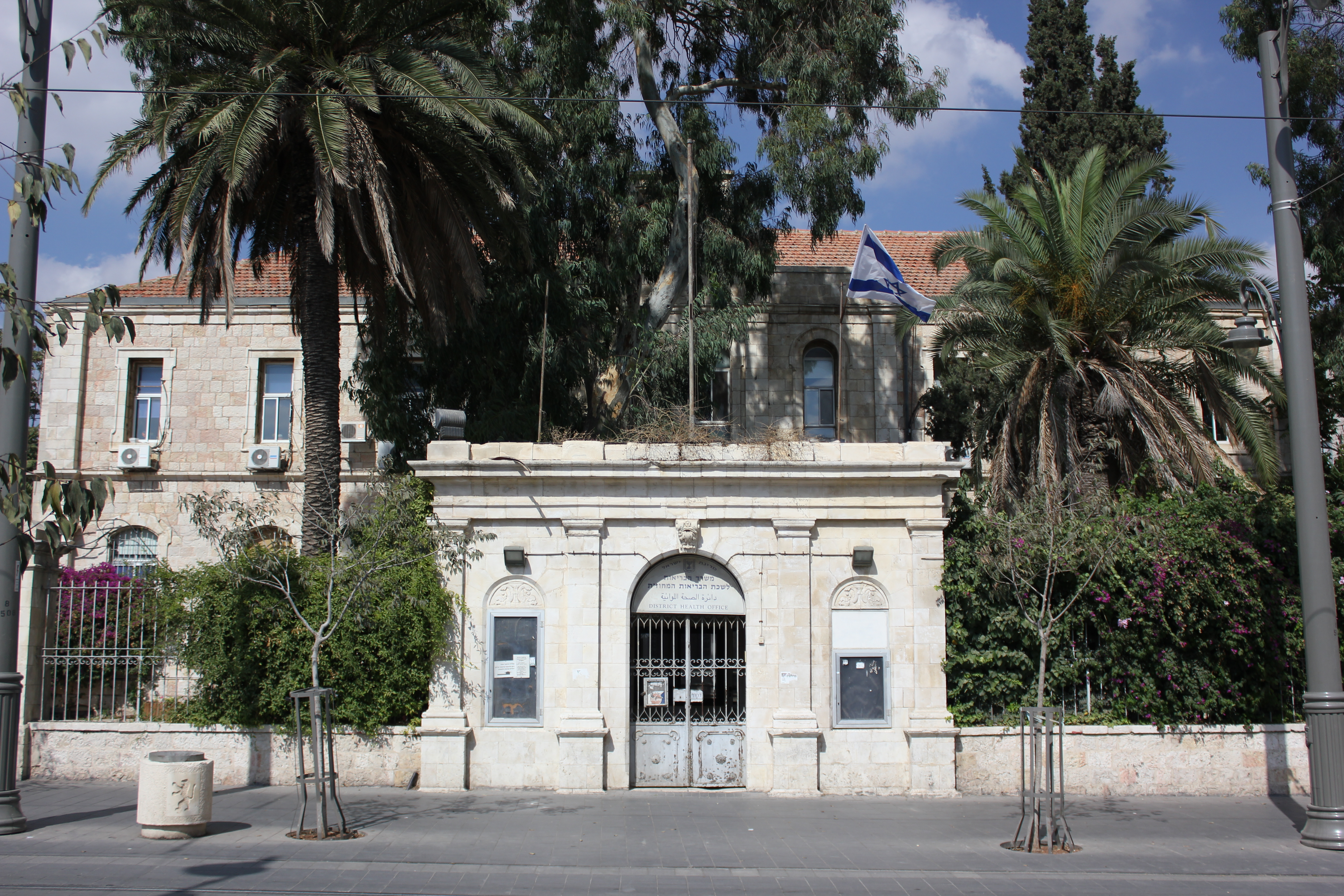 בית הרוחות או המוסתאשפה הוא כינויו של בניין לשכת הבריאות המחוזית של משרד הבריאות בירושלים. נבנה כווילה לערבי אמיד שמת לפני חתונתו והמעבר לבית, ומאז נותר שומם כעשור. לאחר מכן שופץ לבית חולים עות'מאני, ומתקופת הבריטים משמש כלשכת בריאות. הבניין מוסתר מאחורי מבנה שער גדול. בחזית הבית גמלון אבן עליו חקוק סמל האימפריה העות'מאנית.